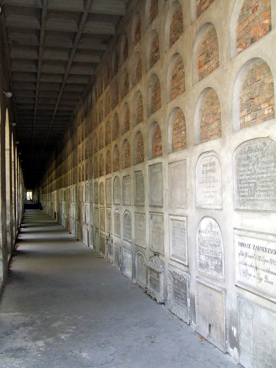 Katakumby Merliniego, Stare Powązki